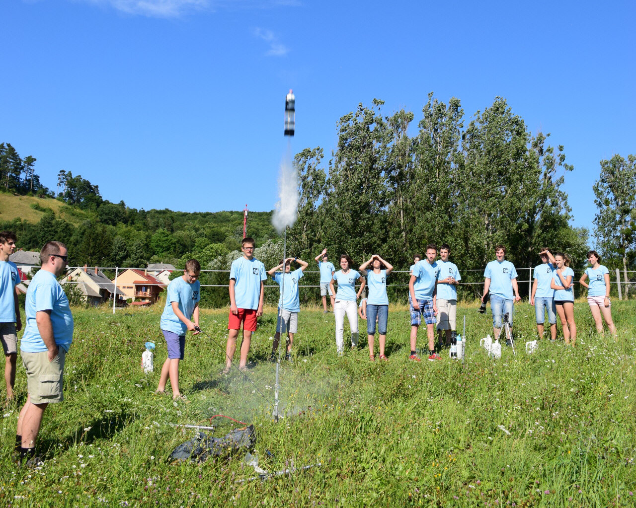 Magyar Űrtábor 2017, Bakonybél, vízirakéta indítása